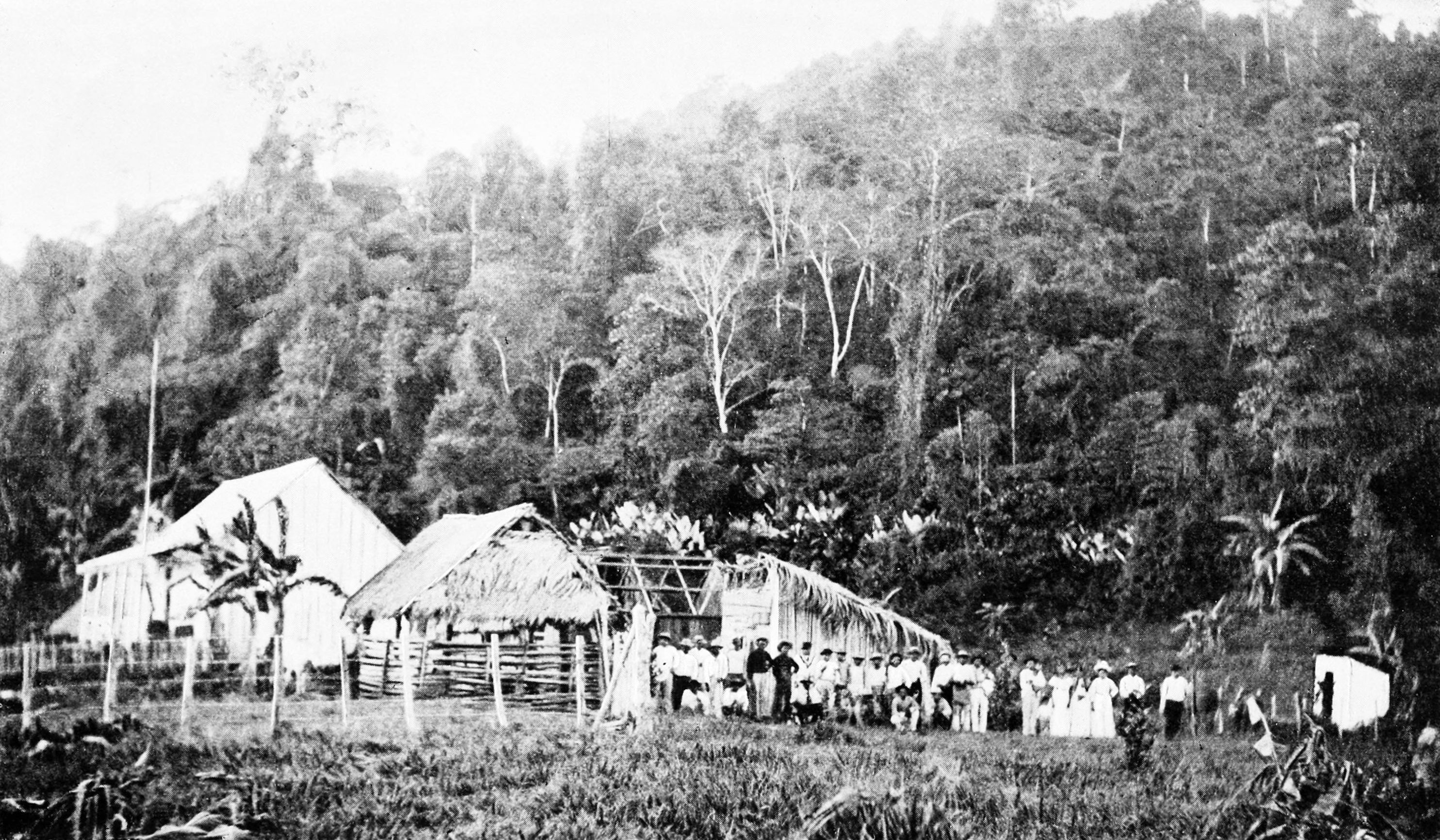 Banana plantation